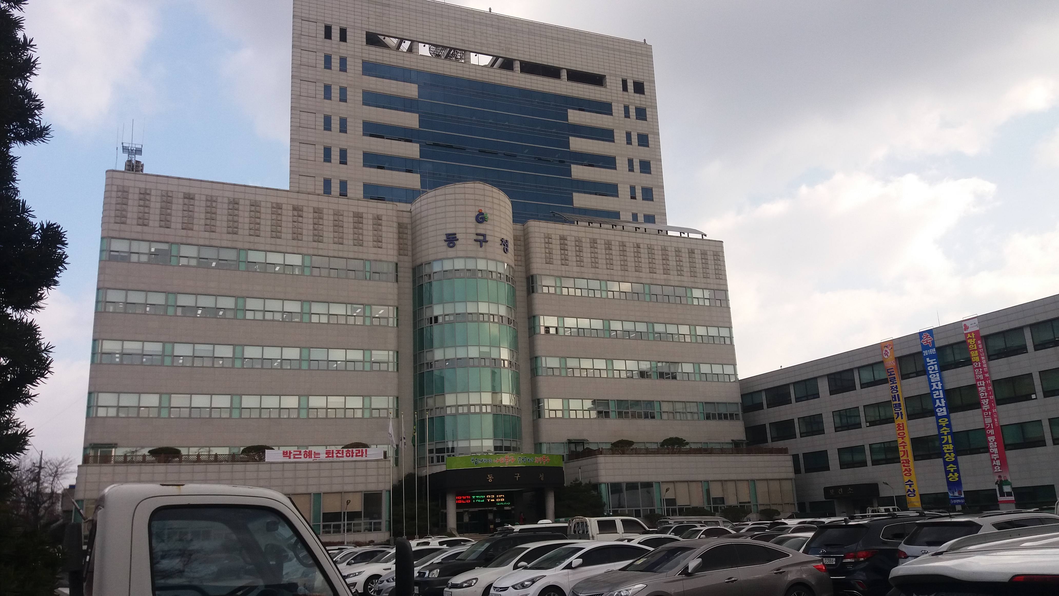 광주광역시 동구청